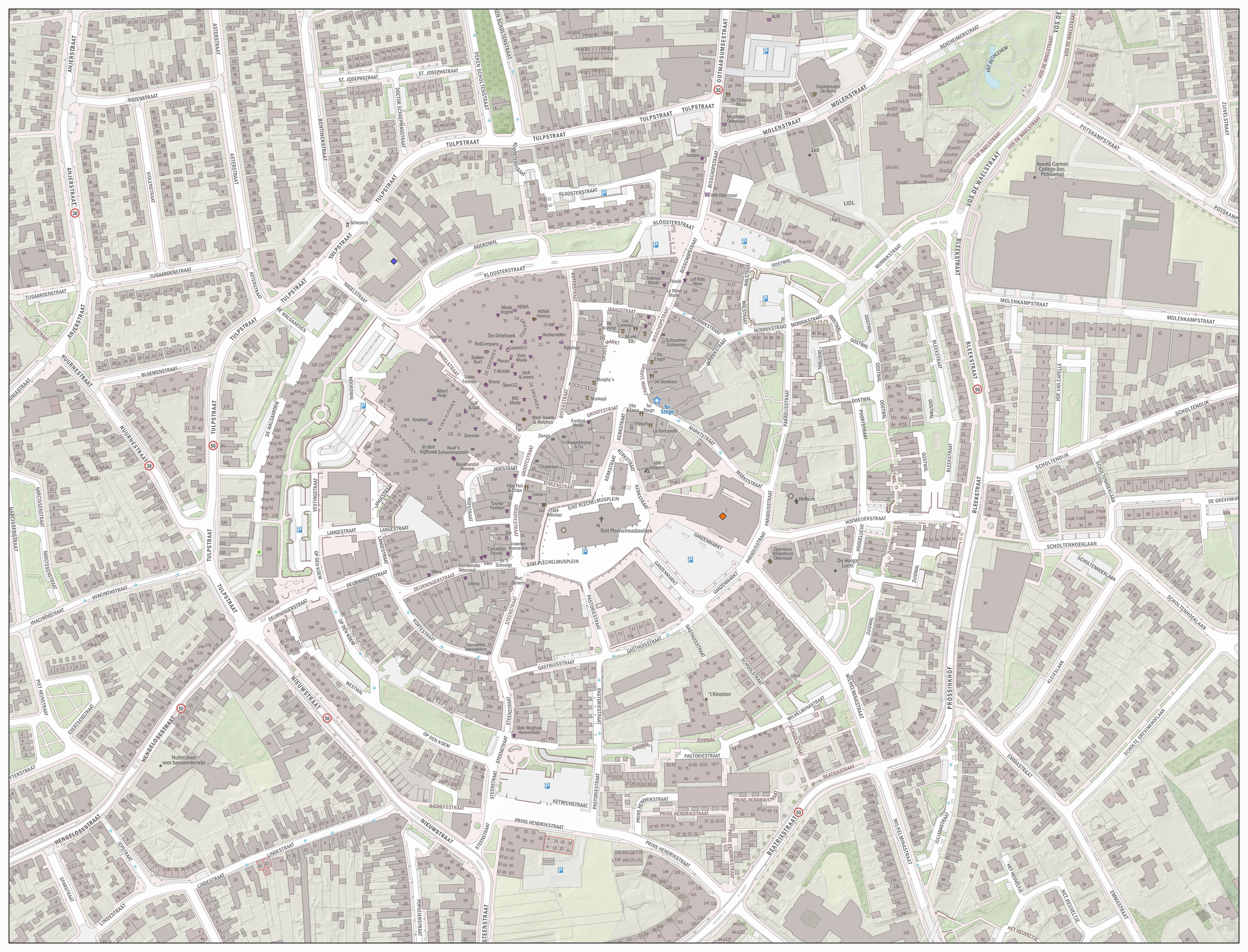 Topografische kaart van Oldenzaal (centrum van woonplaats). Resolutie: 2688 pixels/km. Kaartbeeld samengesteld uit de open geodata van de Basisregistratie Grootschalige Topografie (BGT), Creative Commons-BY Kadaster, en Top10NL en Top25namen (Basisregistratie Topografie, Kadaster), Creative Commons-BY Kadaster. Gebouwvlakken uit open geodata BAG extract, Creative Commons-BY Kadaster. Wegen uit de OpenStreetMap, CC-BY OpenStreetMap bijdragers. Reliëfschaduw uit de Actuele Hoogtekaart AHN2/AHN3. Samenstelling en kleurenschema: Jan-Willem van Aalst, met QGIS2. Zie ook de Legenda.